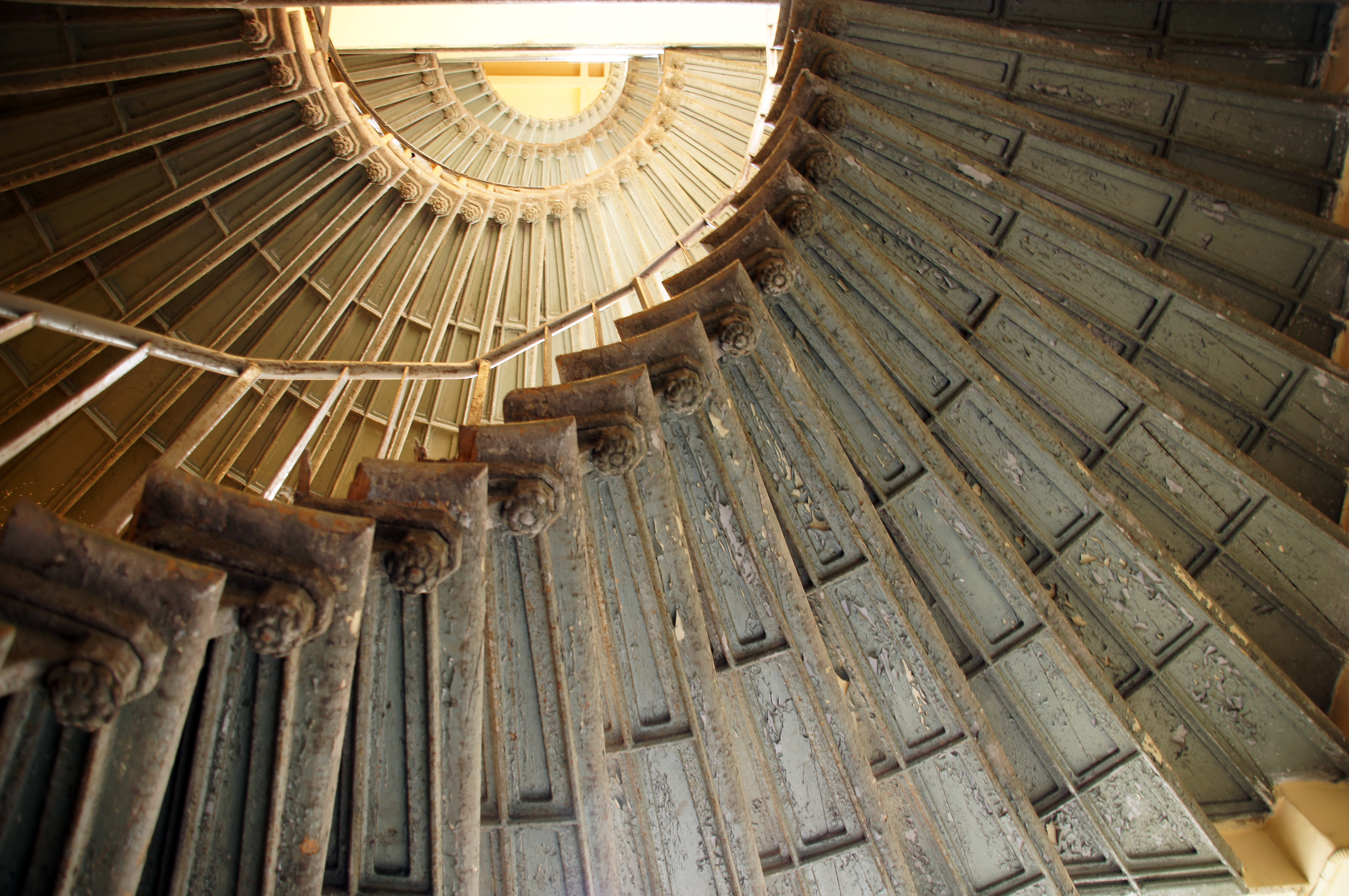 Historyczny układ urbanistyczny Przedmieścia Oławskiego, dzielnicy Wrocławia